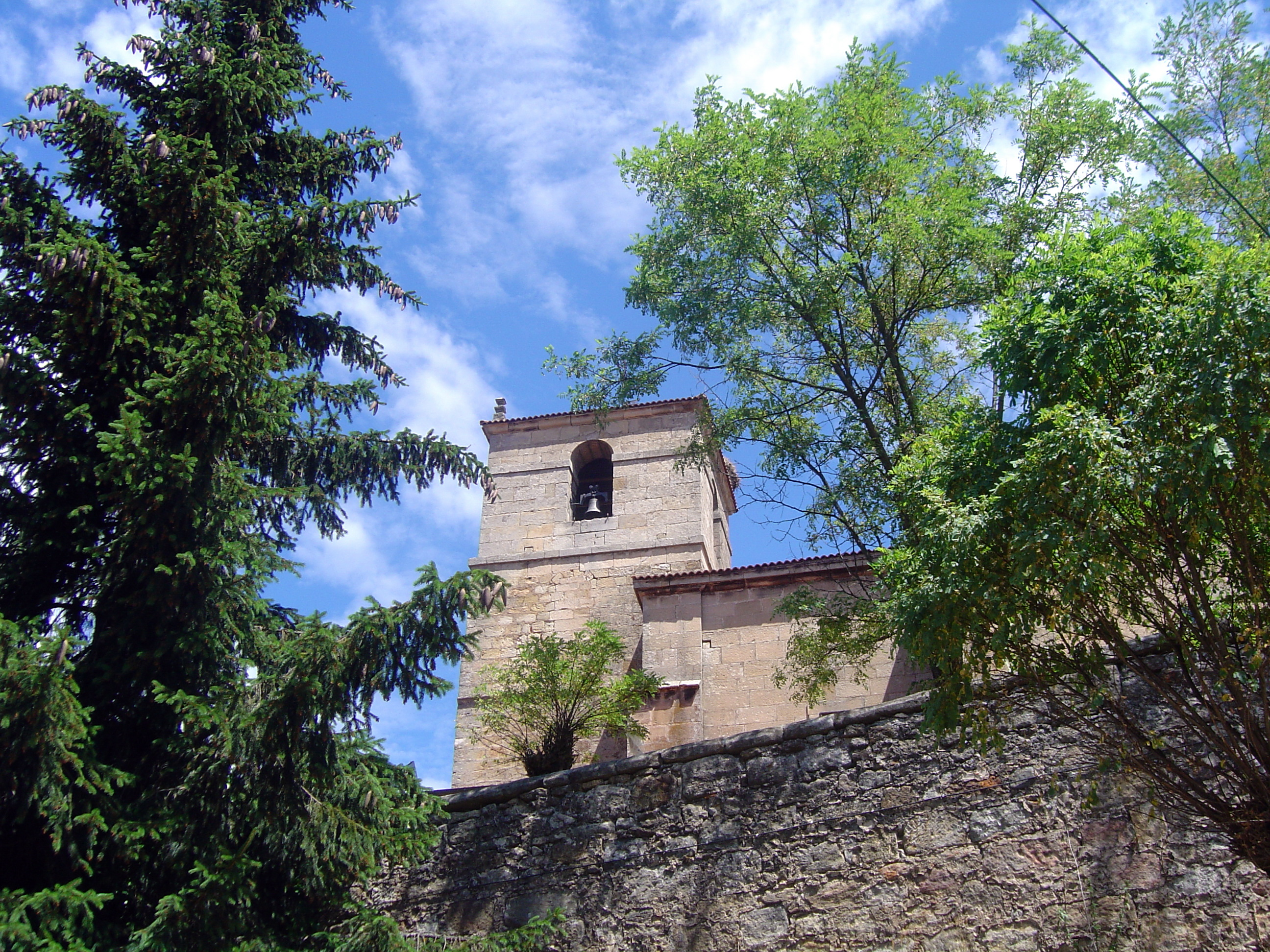 IGLESIA SAN QUIRICO Y STA.JULITA